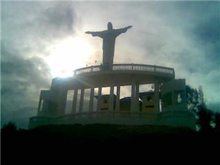 "El Mirador" de San Isidro